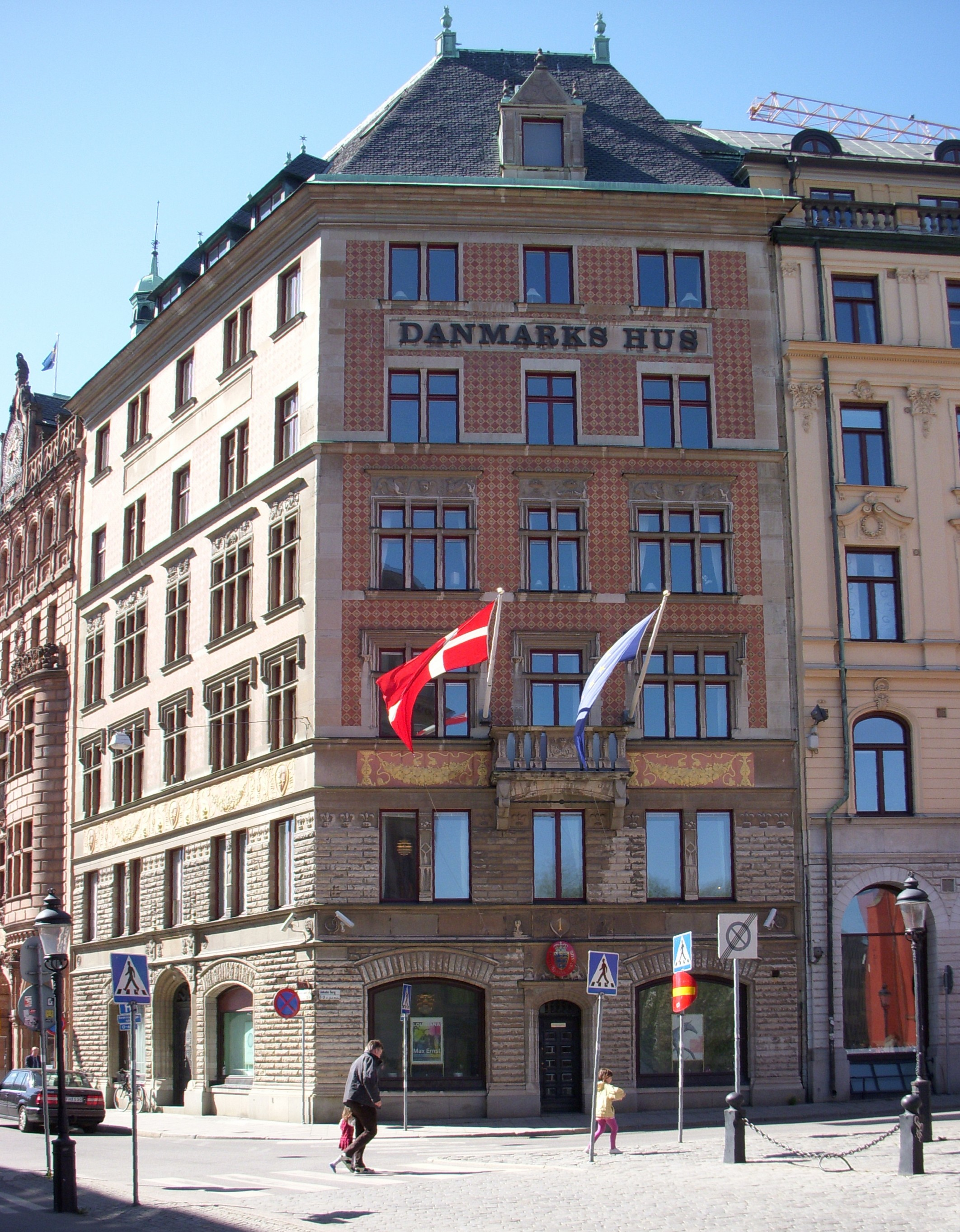 Danmarks hus på Norrmalm i Stockholm